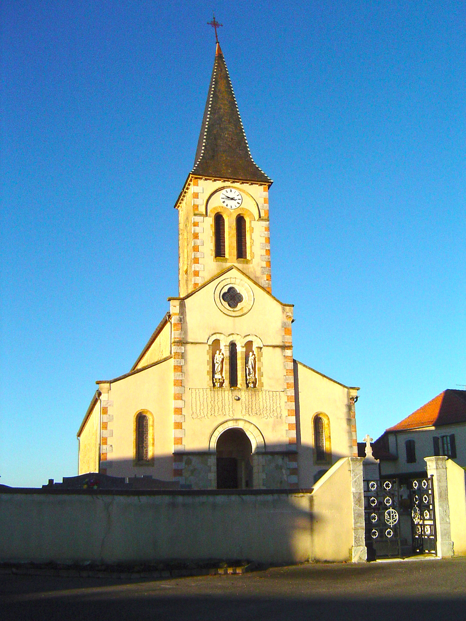 Eglise d'Argelos, Landes, FranceOccitan : Glèisa d'Argelòs; Shalòssa; Gasconha